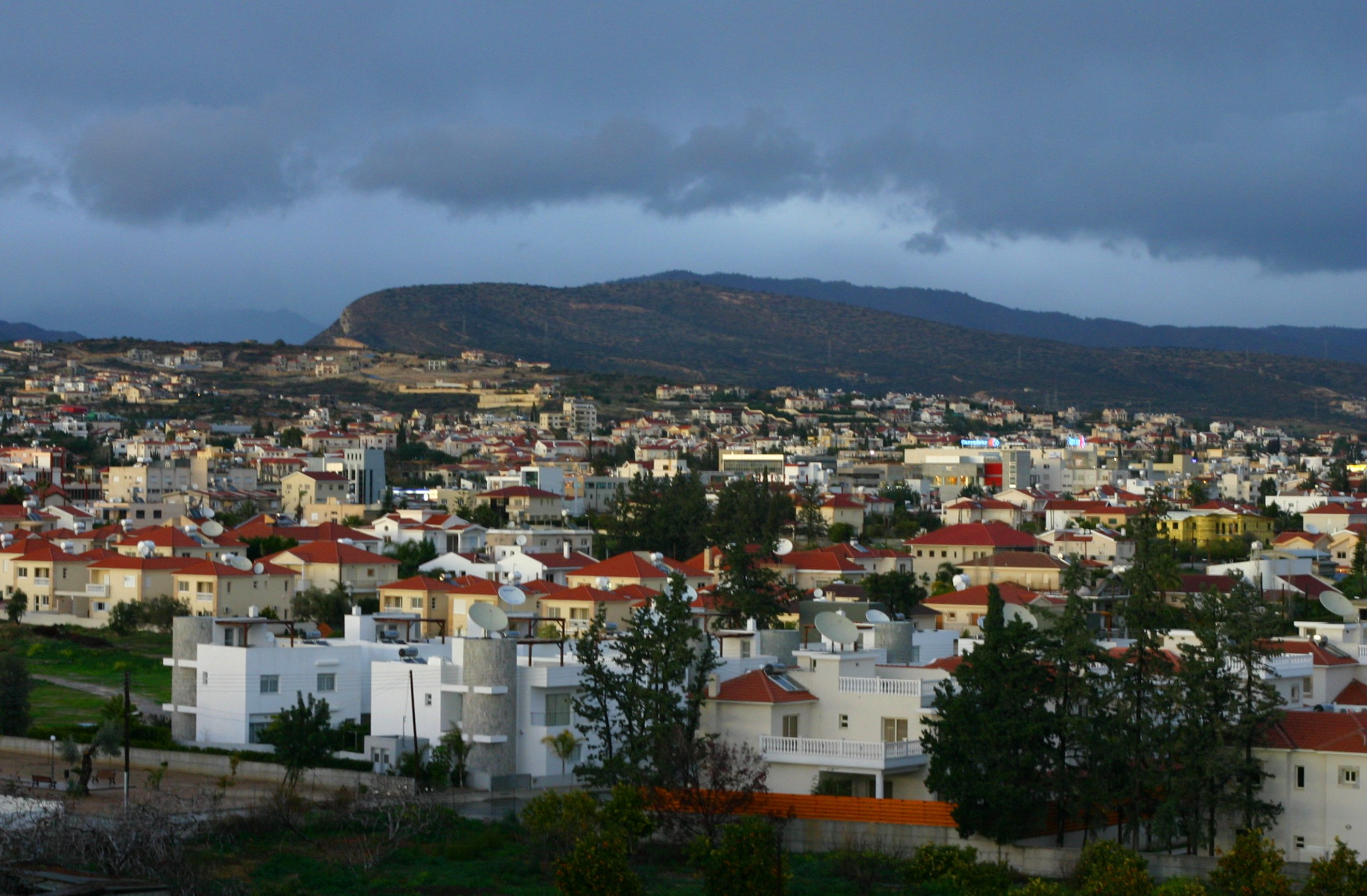 Rainy Limassol